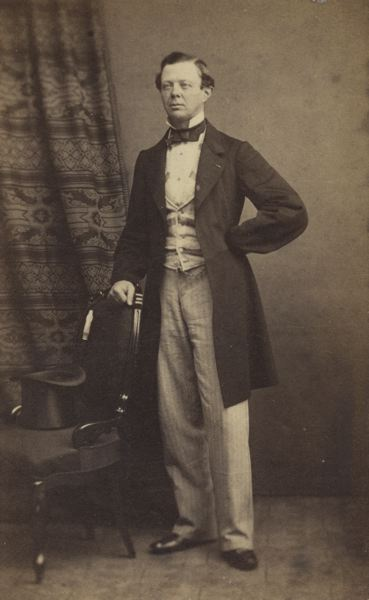 Konsul Fritz Rooth (1816–1883).